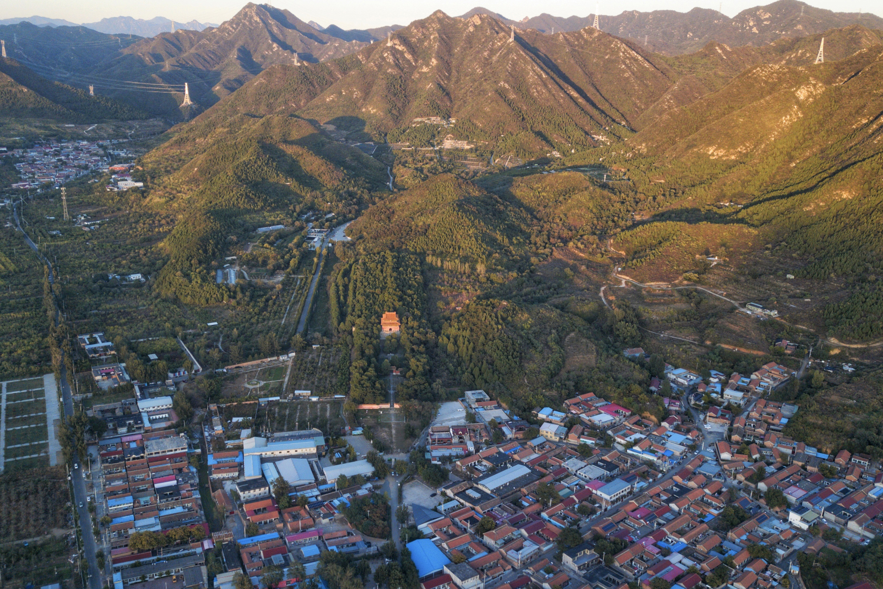 中文（中国大陆）: 明景陵，明宣宗朱瞻基与孝恭章皇后的合葬陵寝。